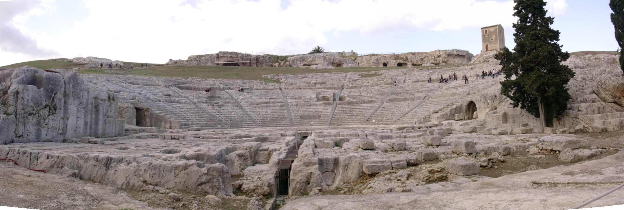 Théâtre de Syracuse, avril 2004 Auteur: Guilhem Dulous